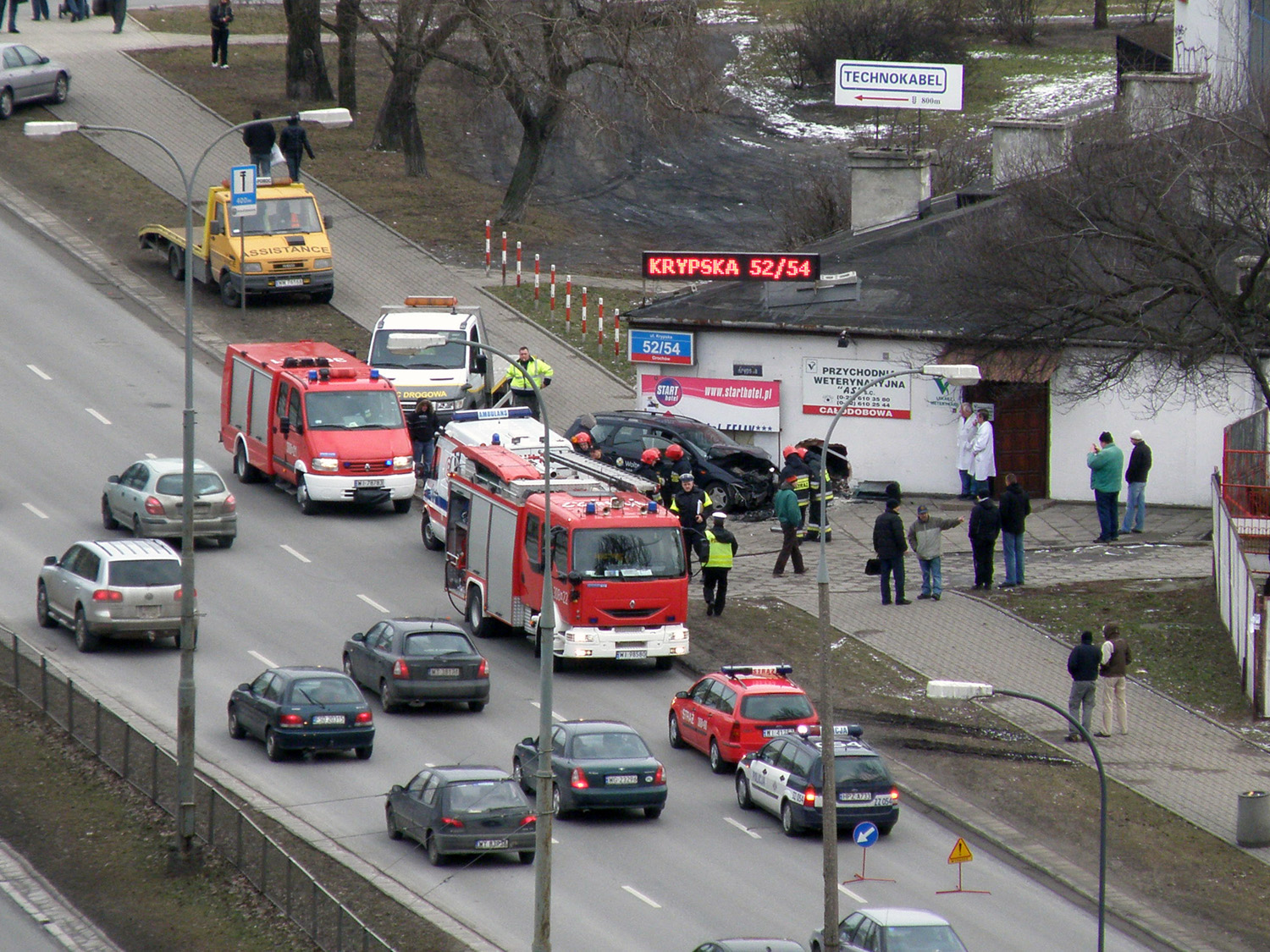 Warszawa, Praga Południe, ul Grochowska/Krypska, samochód wjechał w budynek przychodni weterynaryjnej